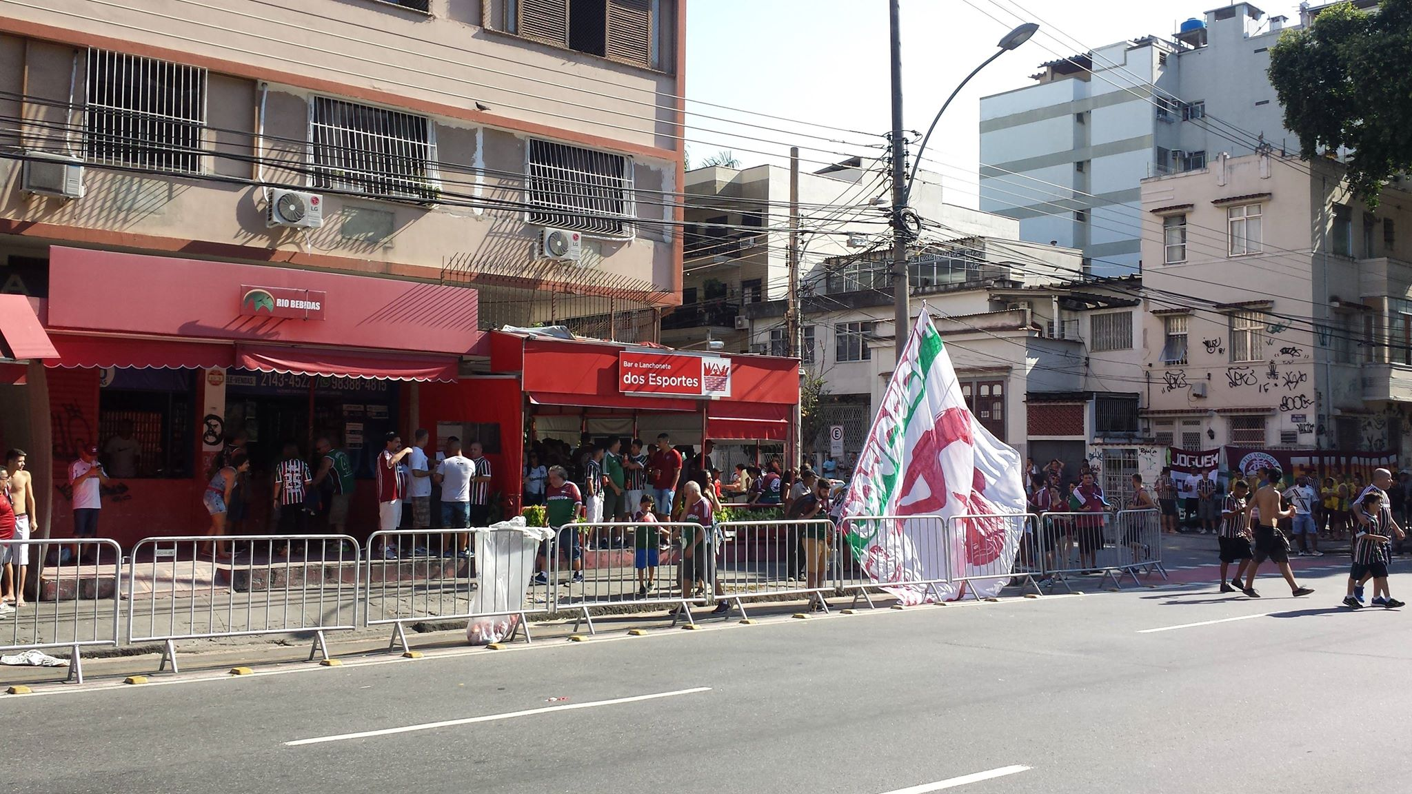 Torcida Fluburgo antes da abertura dos portões do Maracanã em seus arredores aguardando a partida Fluminense 1 a 1 São Paulo em 29 de abril de 2018.